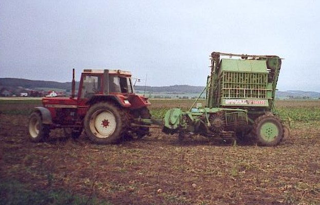 Von einem IHC-Traktor gezogener 2-reihiger Rübenvollernter von Stoll